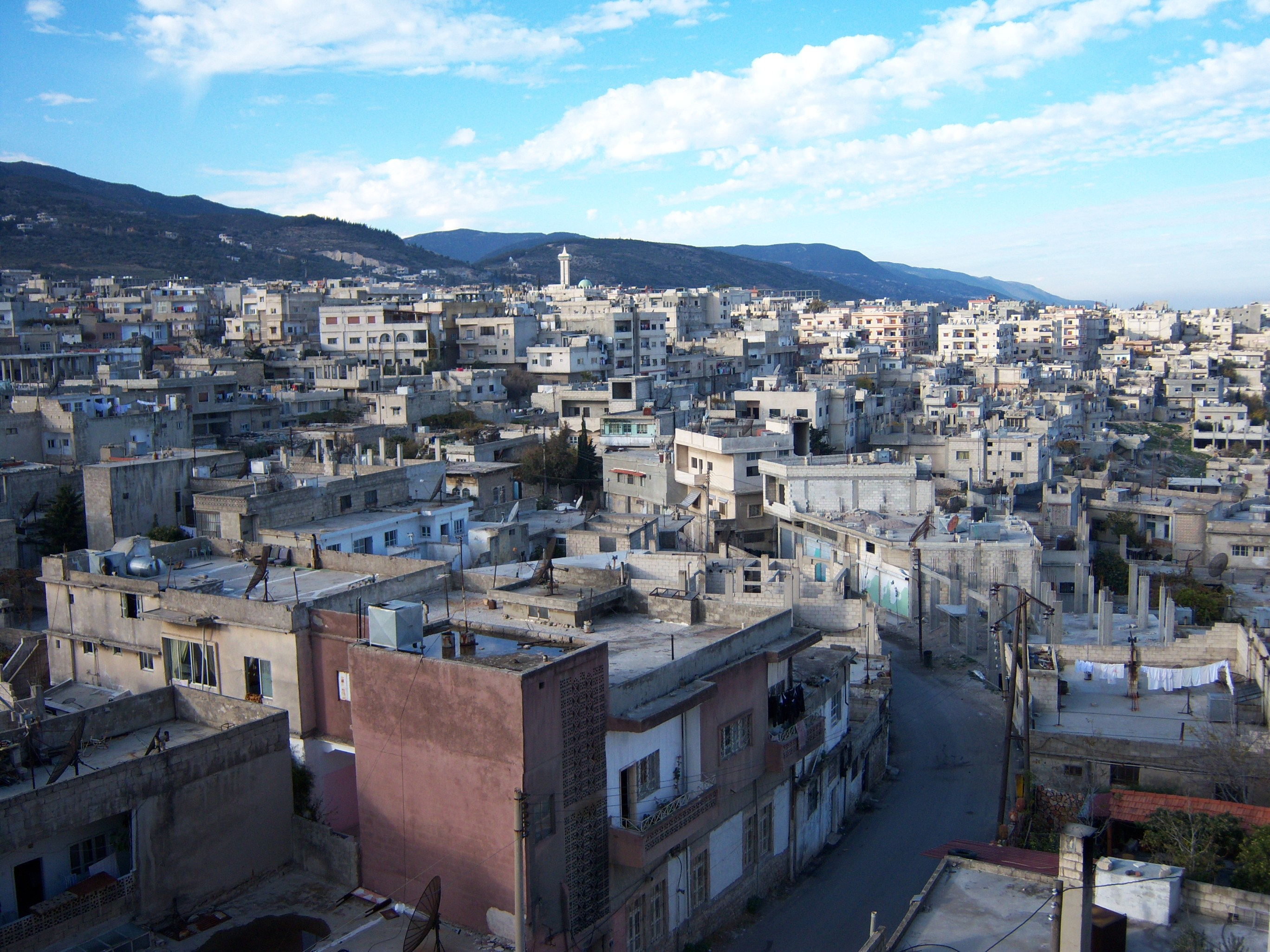 منظر عام لمدينة مصياف